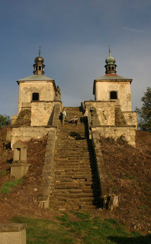 Freitreppe auf dem Neuländer Kapellenberg bei Ostré in Úštěk, Tschechien.